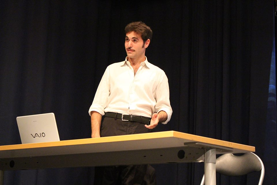 Roberto Disma in "Rete Ribelle", 2017. Foto di Martina Marotta.